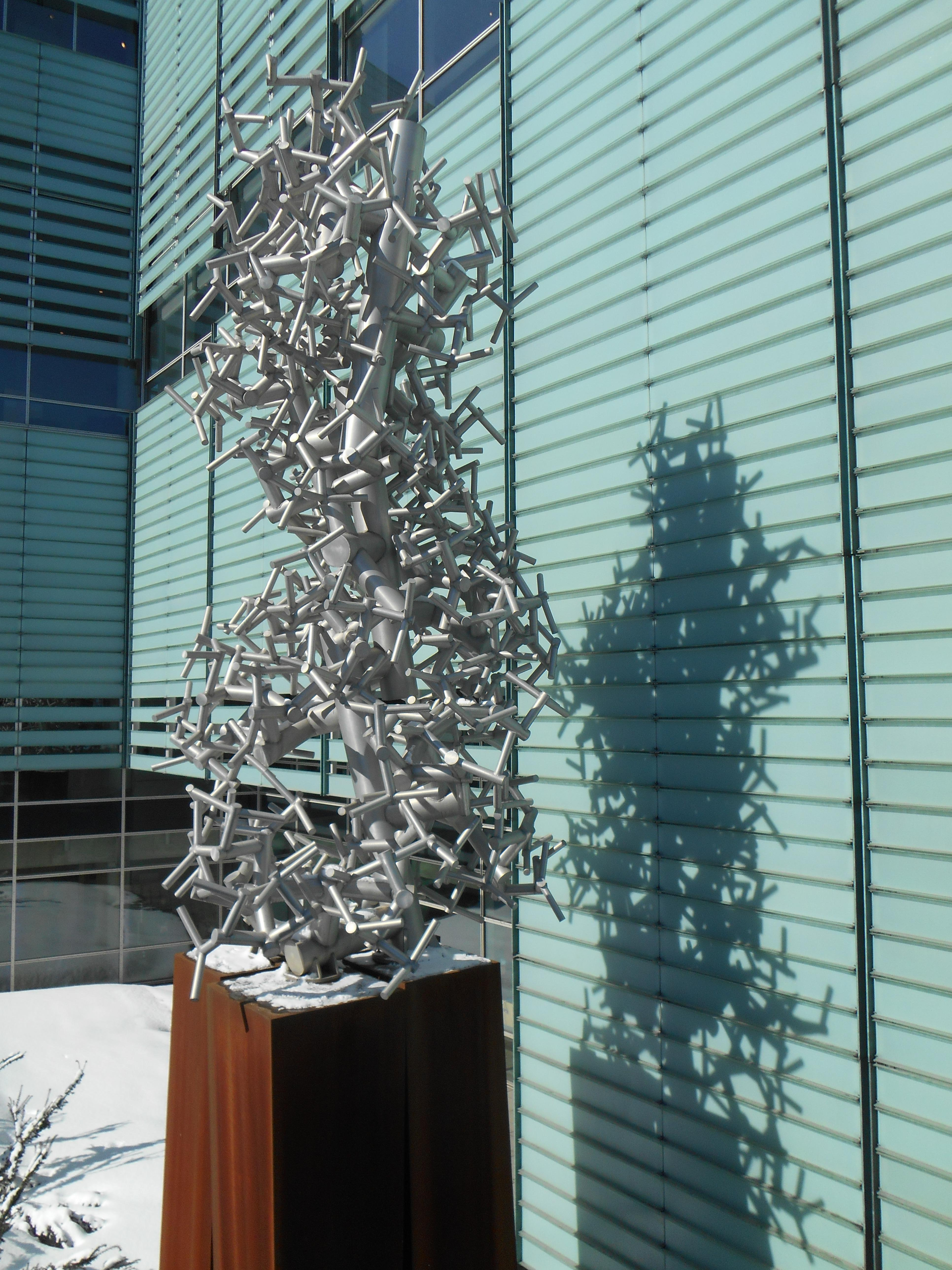 Espace fractal, sculpture de Jean-Pierre Morin, 2004 La Grande Bibliothèque, 475, boulevard De Maisonneuve Est, Montréal